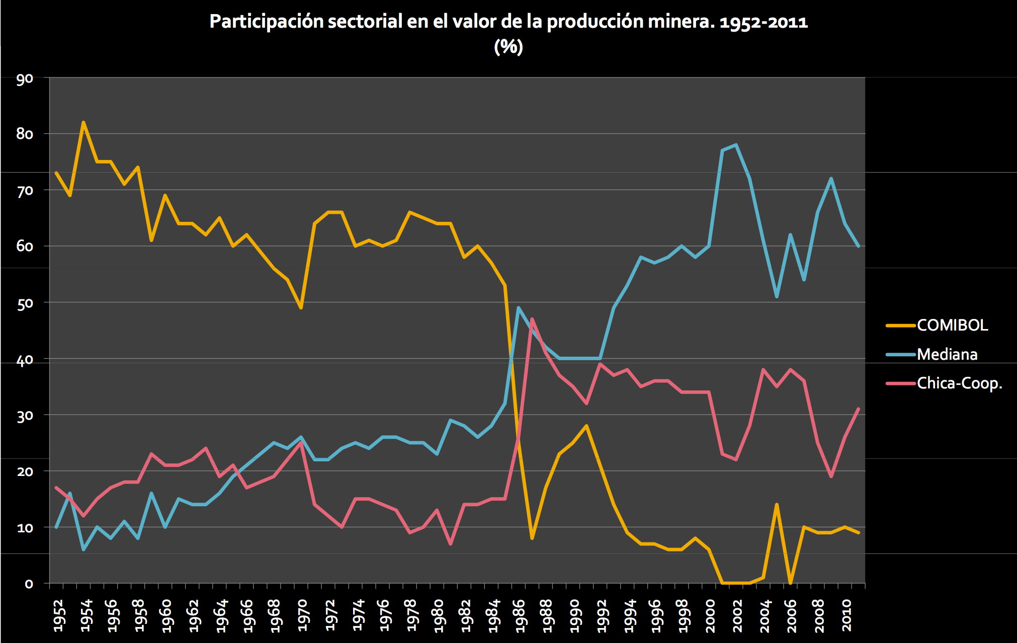 Participación del valor de las exportaciones de COMIBOl, mineria mediana y mineria chica en Bolivia, en porcentajes. Fuente: CEDIB